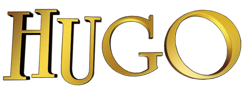 Logotipo pelicula Hugo